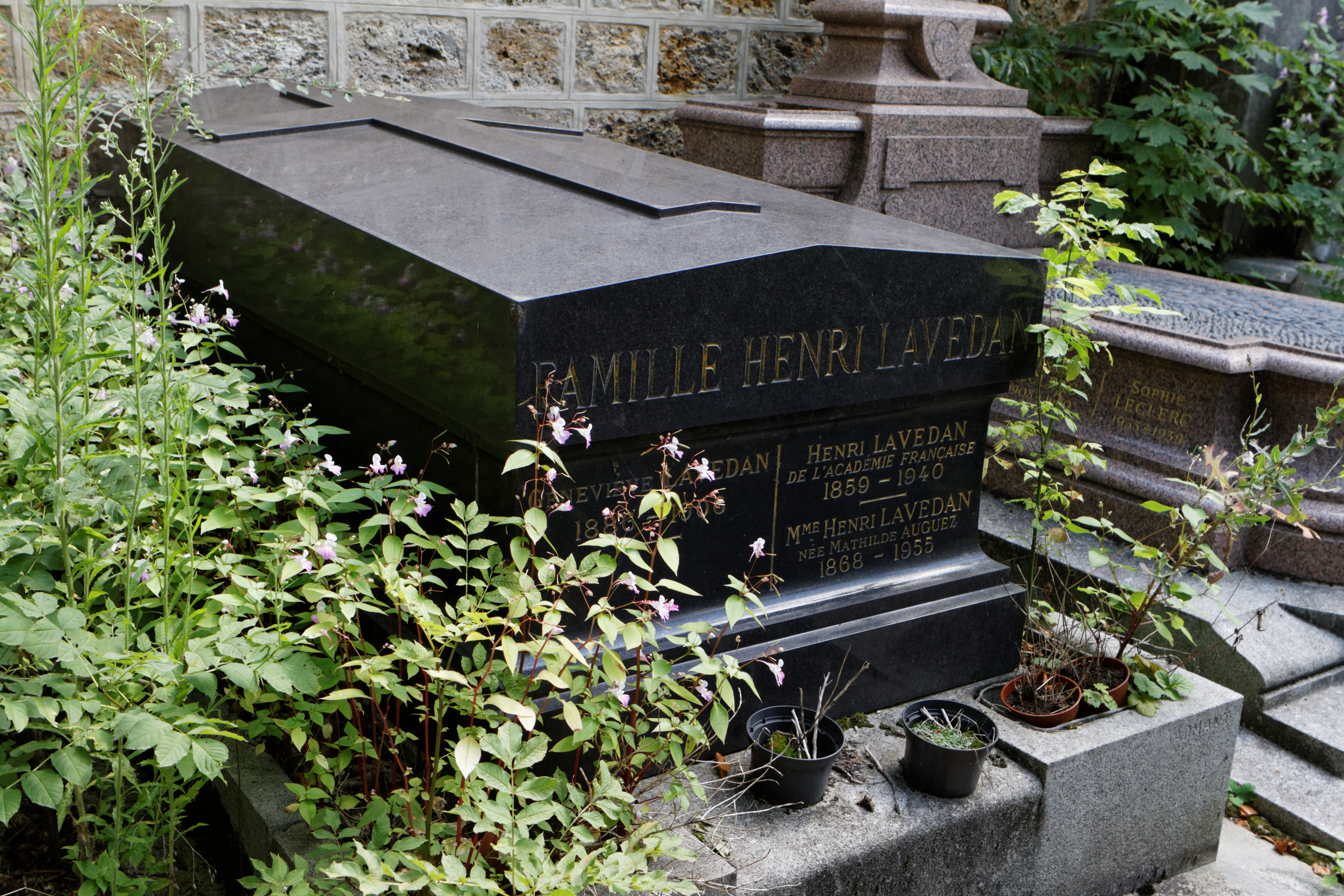 Sépulture du journaliste et auteur dramatique Henri Lavedan (1859-1940), son épouse Mathilde Auguez (1868-1955) et leur fille Geneviève Lavedan (1886-1906).